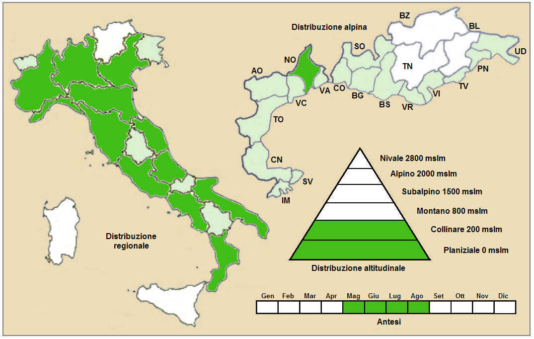 Thalictrum flavum - Distribuzione